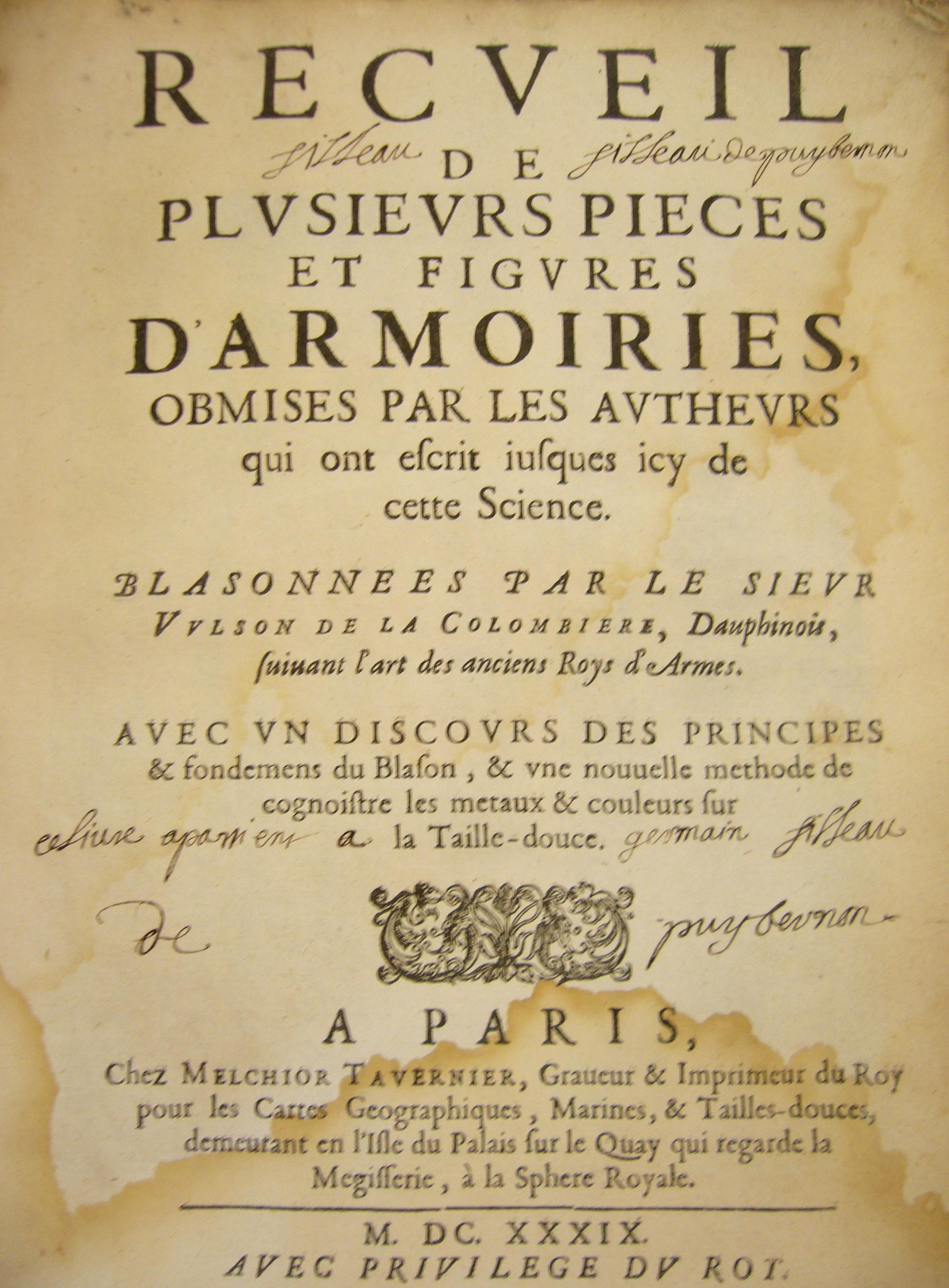 Marcus Vulson de la Colombire, 1639 címlap